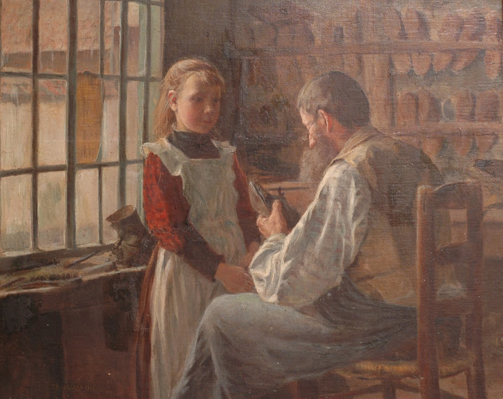 Peinture à l'huile de Jean de FRANCQUEVILLE